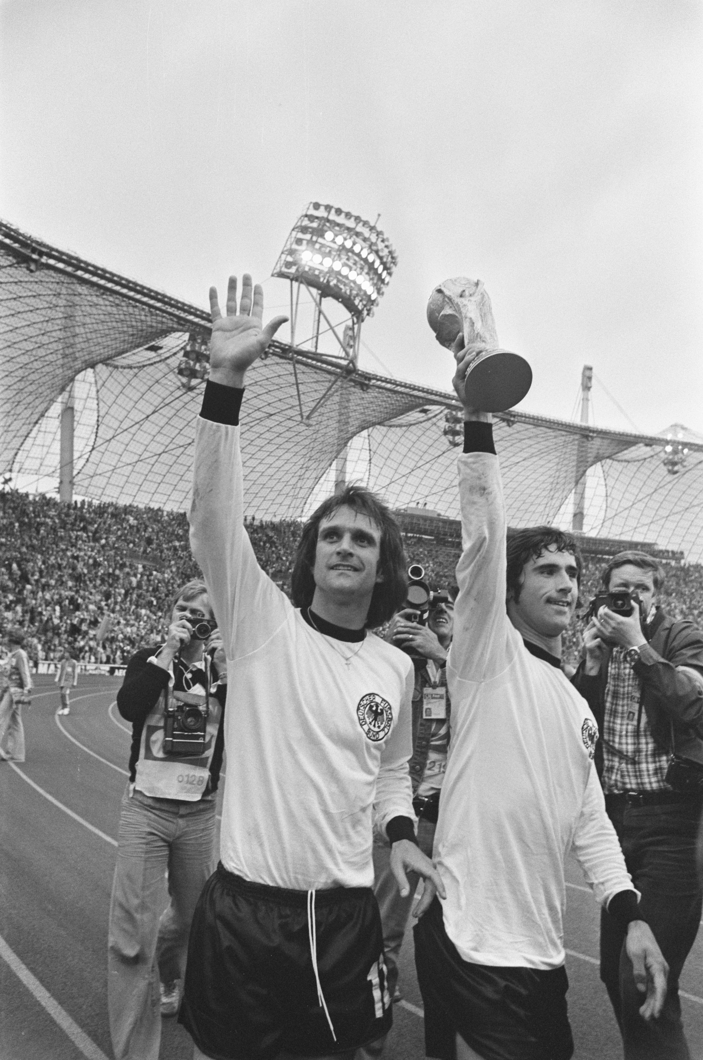 Collectie / Archief : Fotocollectie Anefo Reportage / Serie : [ onbekend ] Beschrijving : Finale wereldkampioenschap voetbal 1974 in Munchen, West Duitsland tegen Nederland 2-1; Gerd Muller met de wereldbeker, links Wolfgang Overath Datum : 7 juli 1974 Locatie : München, Nederland, West-Duitsland Trefwoorden : finales, sport, voetbal, wereldkampioenschappen Persoonsnaam : Gerd Muller Instellingsnaam : Nederland Fotograaf : Verhoeff, Bert / Anefo Auteursrechthebbende : Nationaal Archief Materiaalsoort : Negatief (zwart/wit) Nummer archiefinventaris : bekijk toegang 2.24.01.05 Bestanddeelnummer : 927-3080